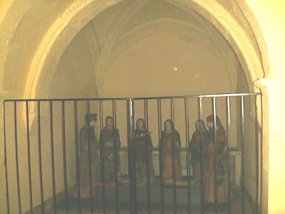 Compianto (XV secolo), Chiesa di San Giacomo - Cagliari